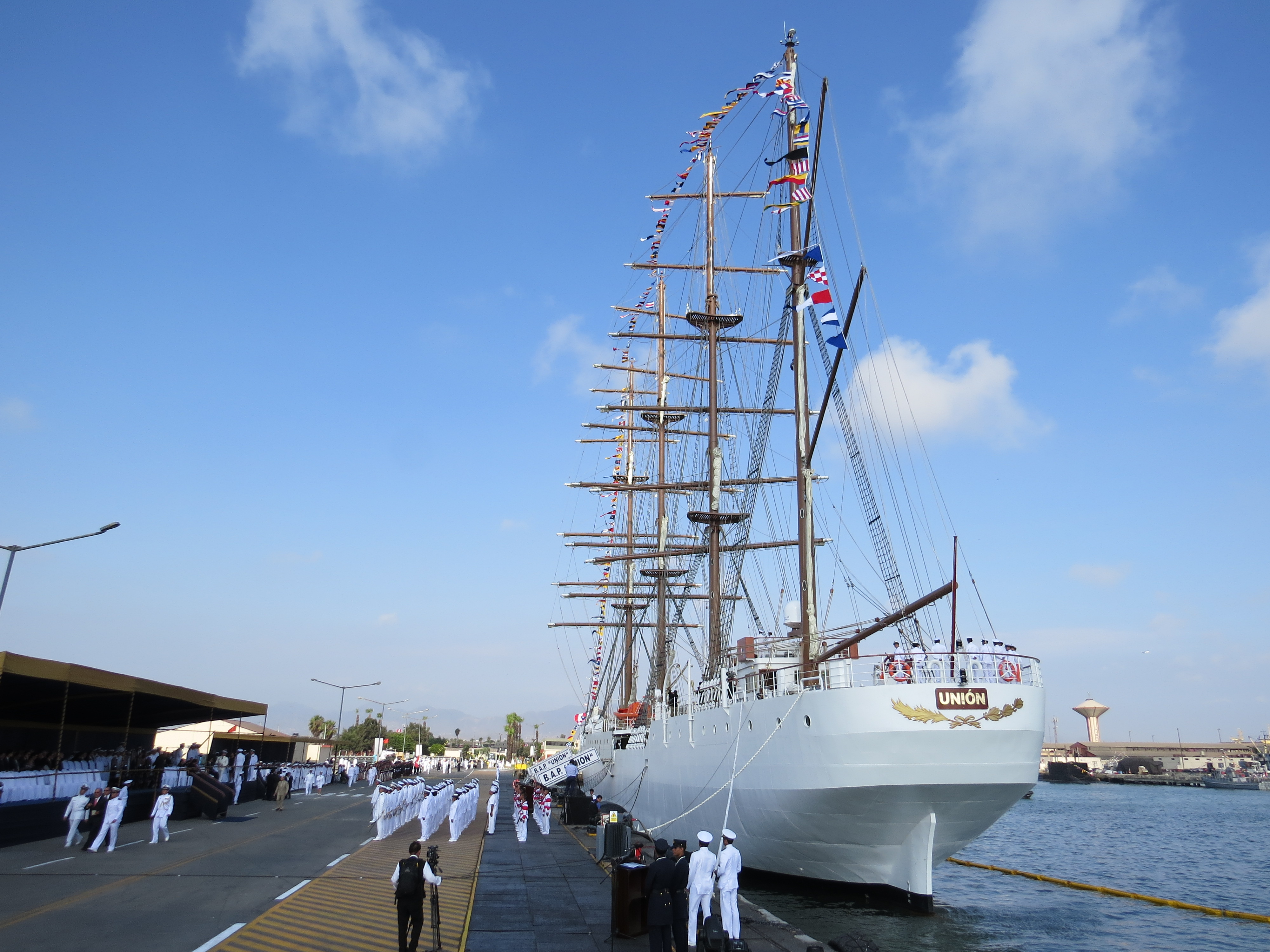 BAP Unión en Base Naval del Callao (ceremonia de incorporación a servicio)